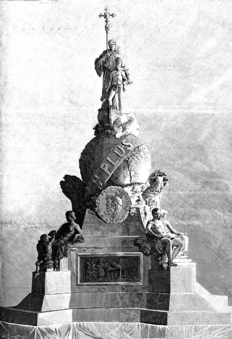 Monumento a Cristóbal Colón de Valladolid. España.